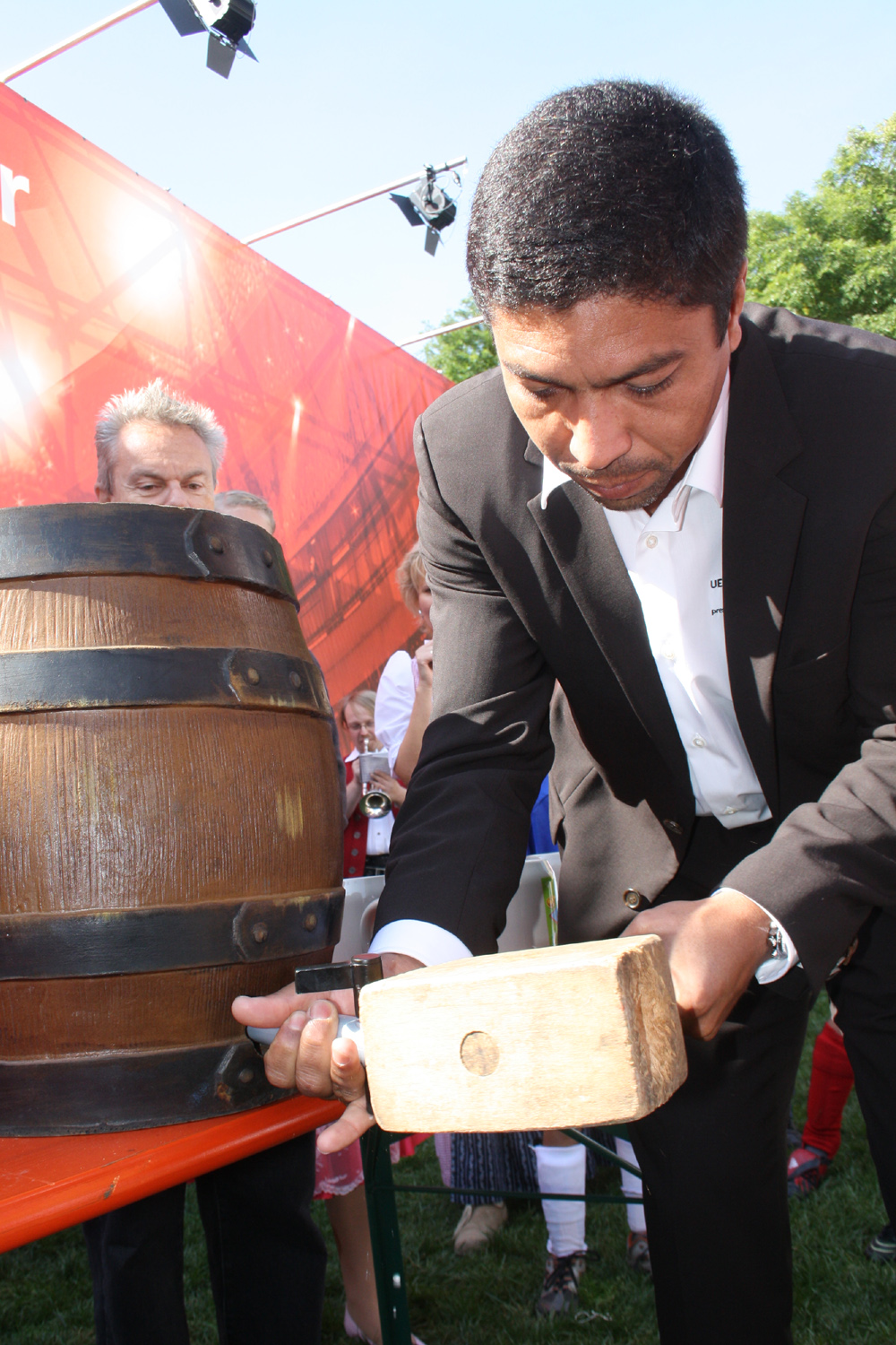 Giovane Élber zapft am 18.10.2010 um 12 Uhr (parallel zur gleichzeitig eröffneten Wiesn) in München ein Fass (Frei-)Bier an. Ort: Vor dem Zelt der UEAF Champions League Trophy Tour auf dem Münchner Marienhof.